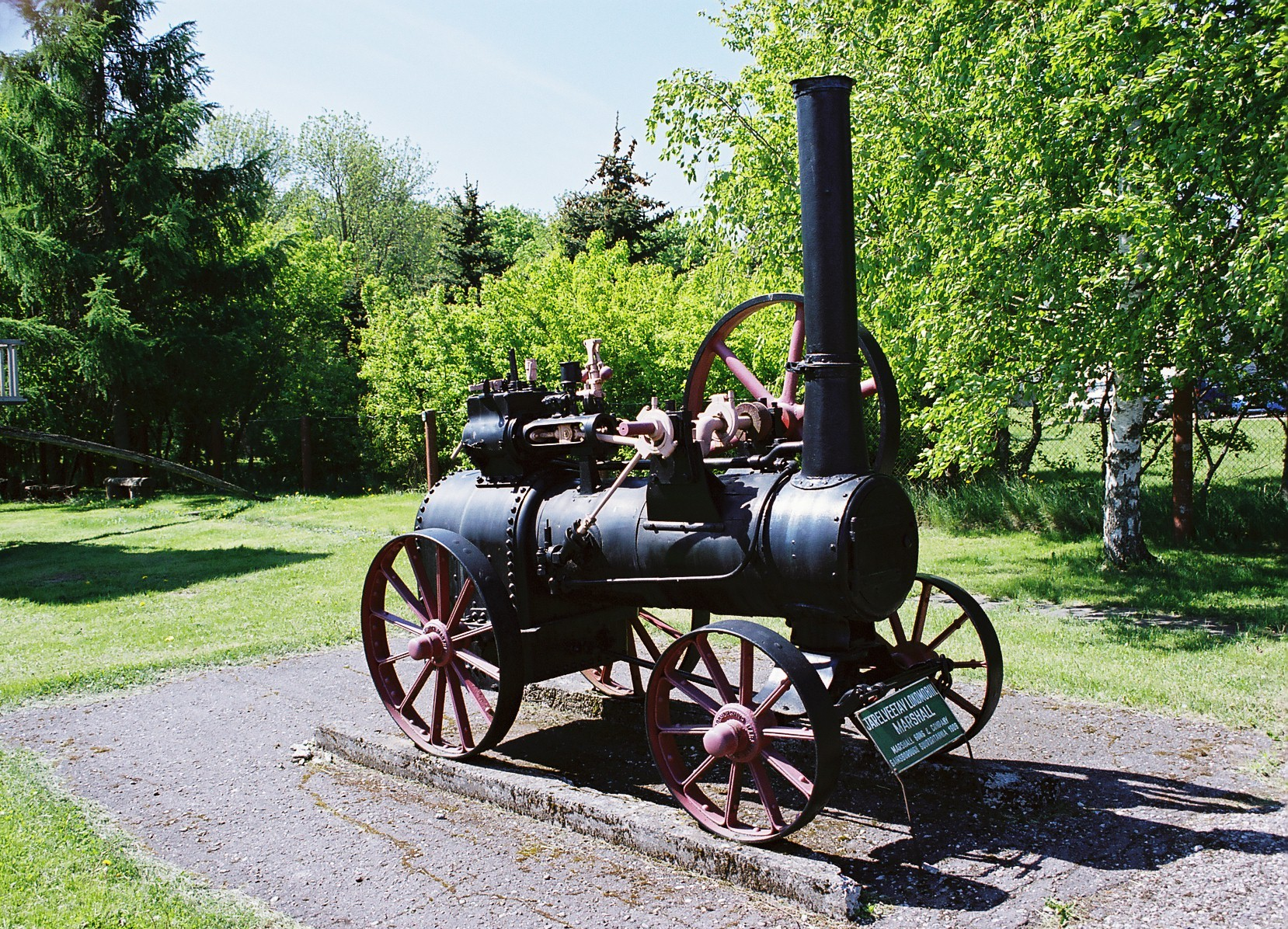 Järelveetav lokomobiil Marshall; Marshall, Sons & Company